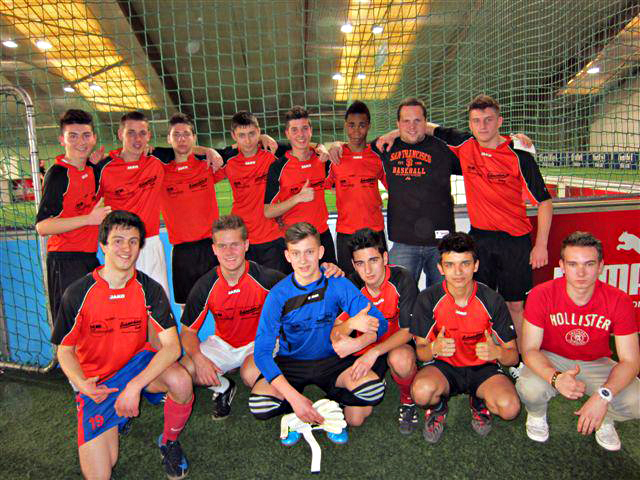 Die Schulmannschaft der Johannes Gutenberg Realschule